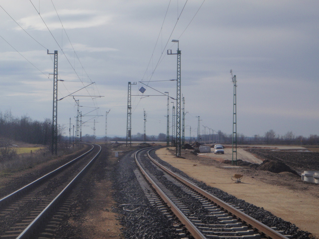 Bahnstrecke bei Boba